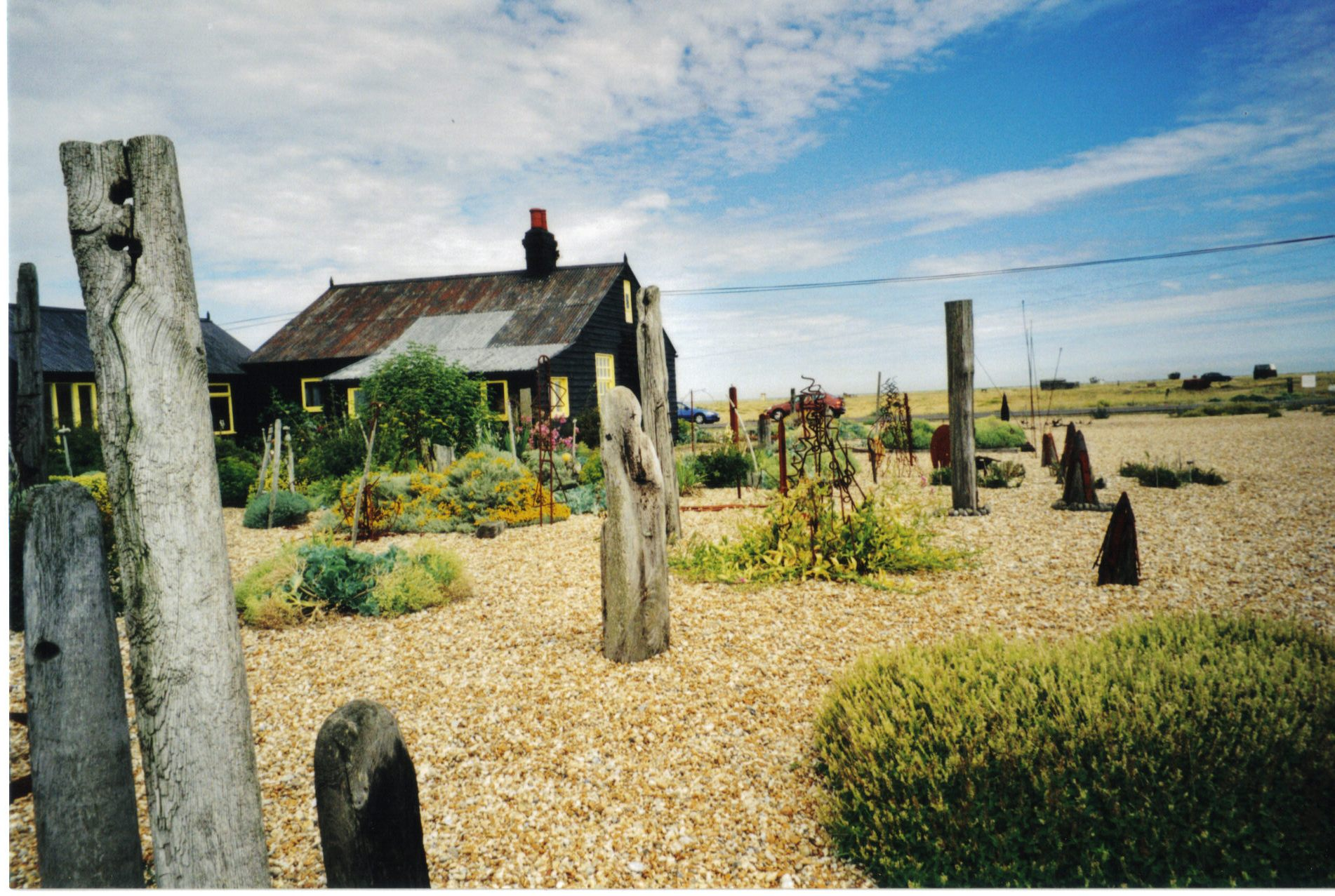 Derek Jarman's garden